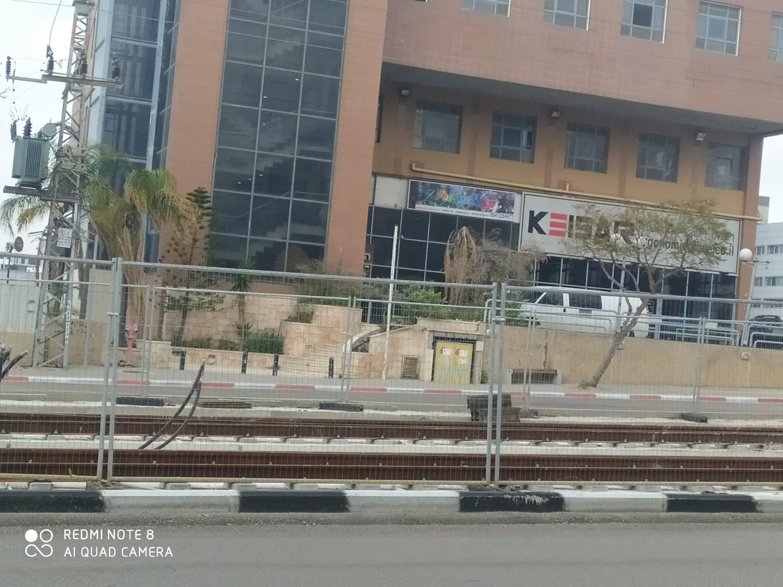 מסילות הרכבת בפתח תקווה